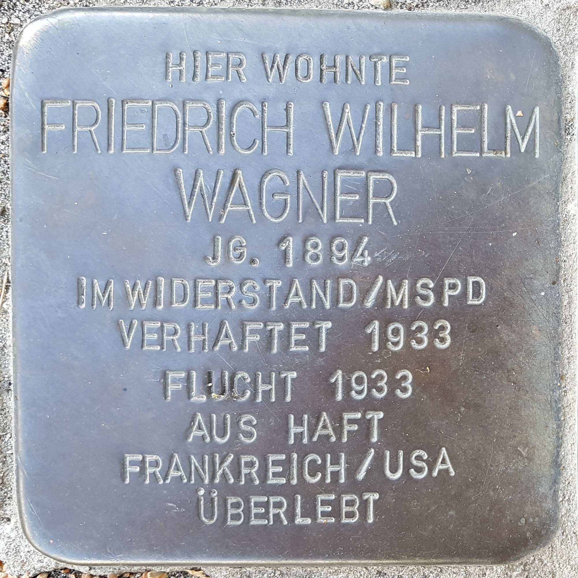 Stolperstein Friedrich Wilhelm Wagner vor dem Gebäude Rubensstraße 25 in 67061 Ludwigshafen